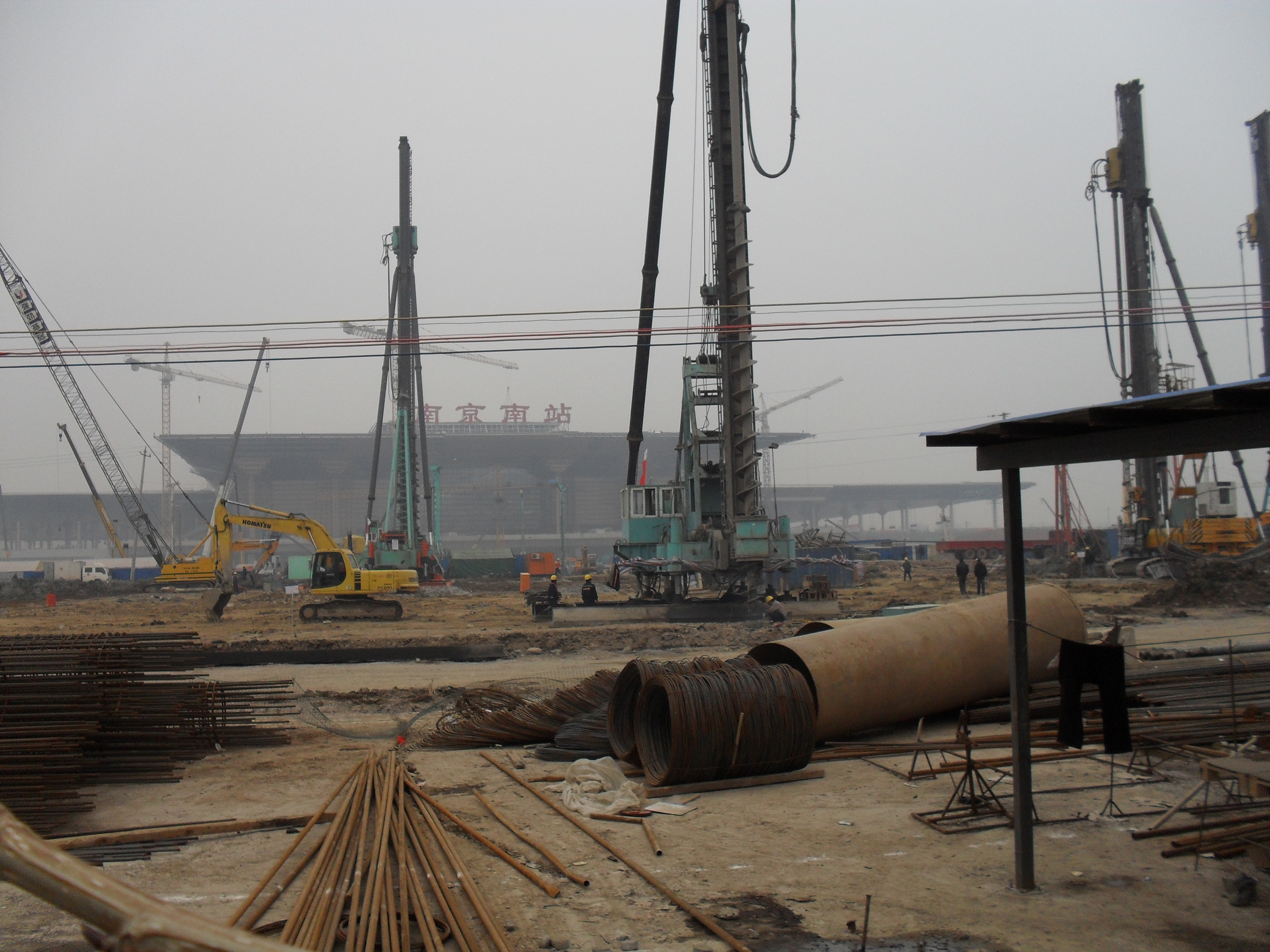 南京玉兰路看建设中高铁南京南站